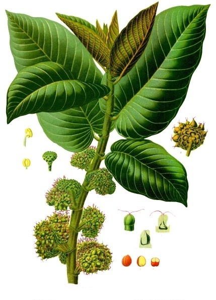 Castilla elastica. A blühender Zweig. B weiblicher Blütenstand; 1 männlicher Blütenstand; 2 Staubblatt von der Rückenseite; 3 dasselbe von der Bauchseite; 4 weibliche Blüte; 5 dieselbe im Längsschnitt; 6 unreife Frucht mit Perigon im Längsschnitt; 7, 8, 9 Samen, sowie dessen Längsschnitt und Querschnitt. A 1/2, B, 7, 8, 9 natürliche Grösse, 1 bis 6 vergrössert.